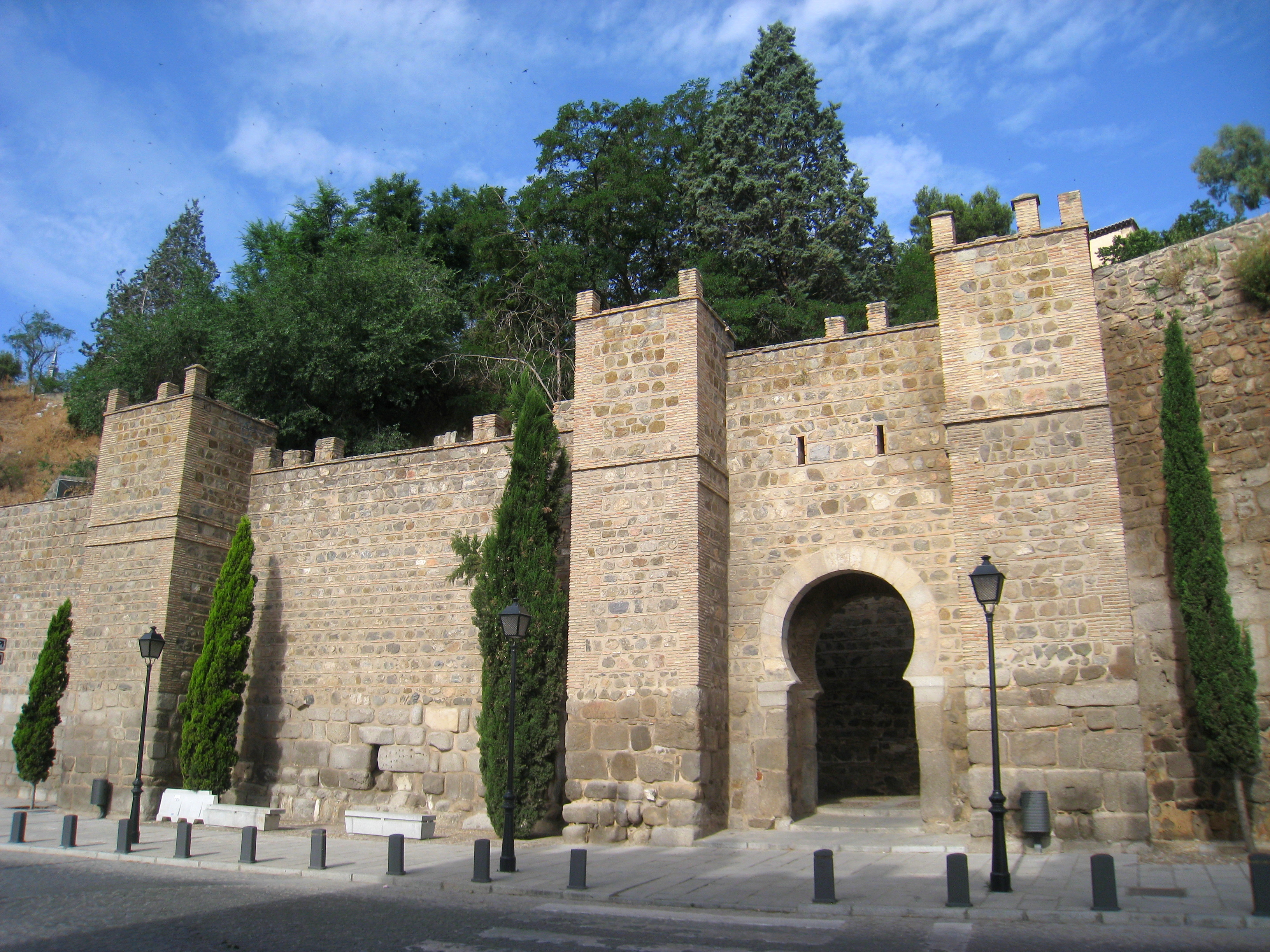 Wall near Puente de Alcantara, Toledo, Spain.